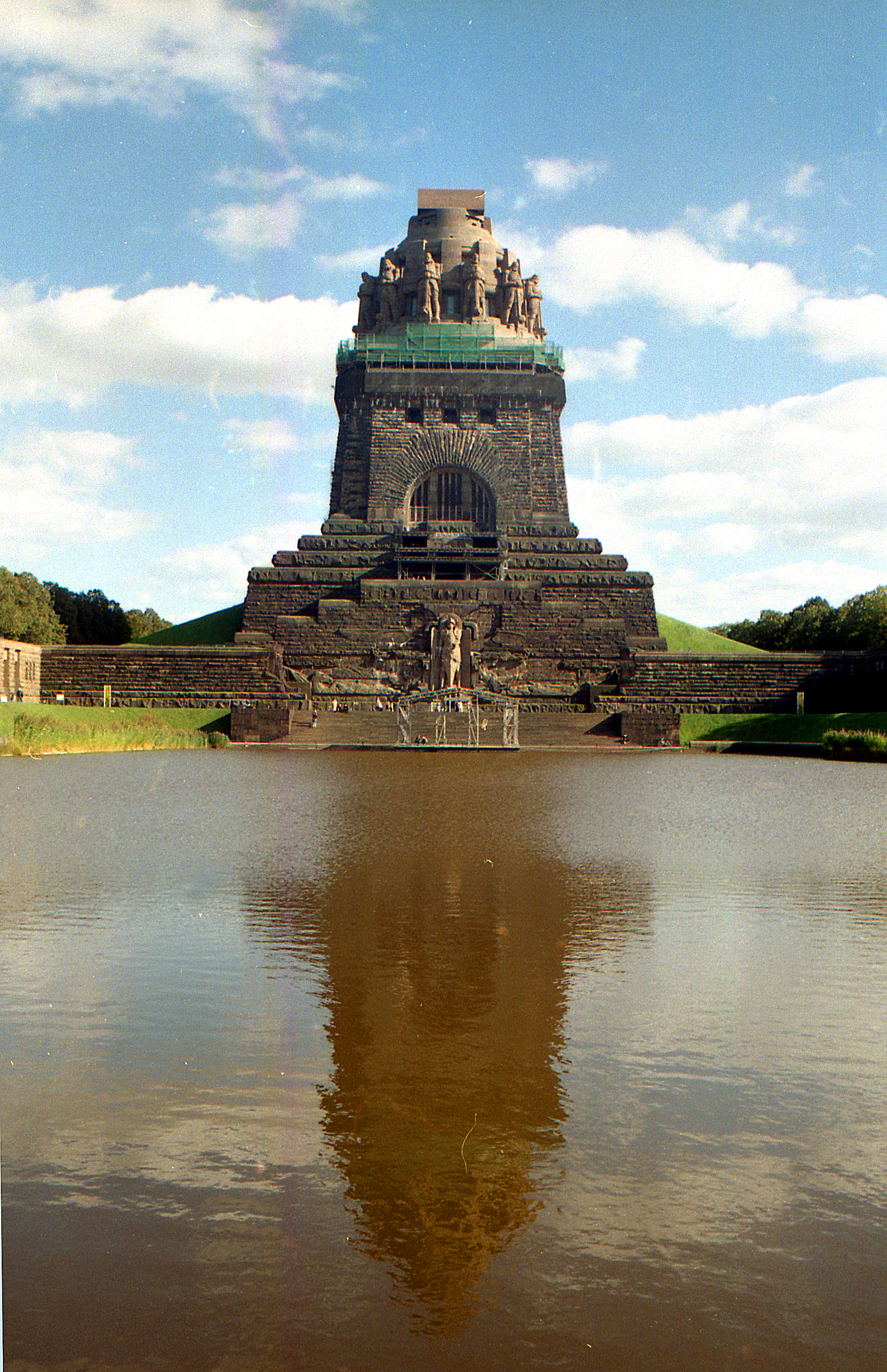 Völkerschlachtdenkmal in Leipzig